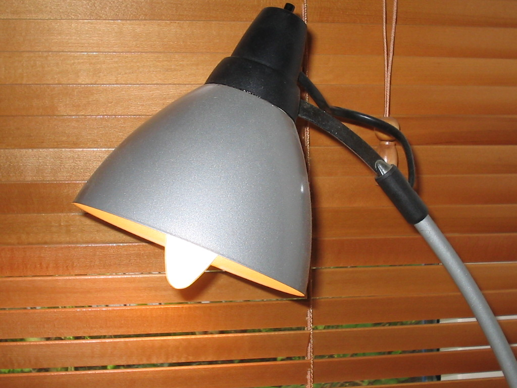 lamp